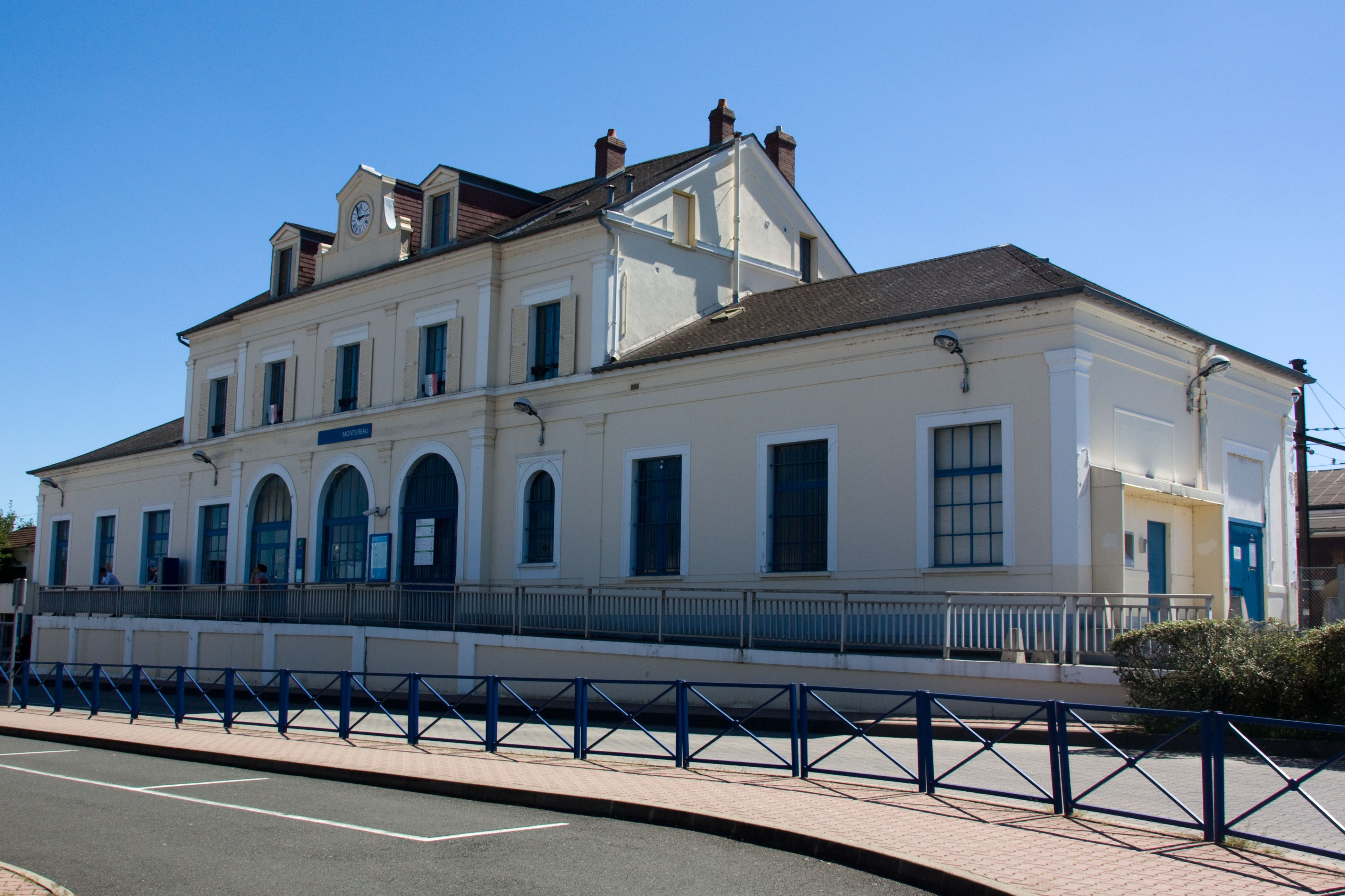 Gare de Montereau, Montereau, Seine-et-Marne, France